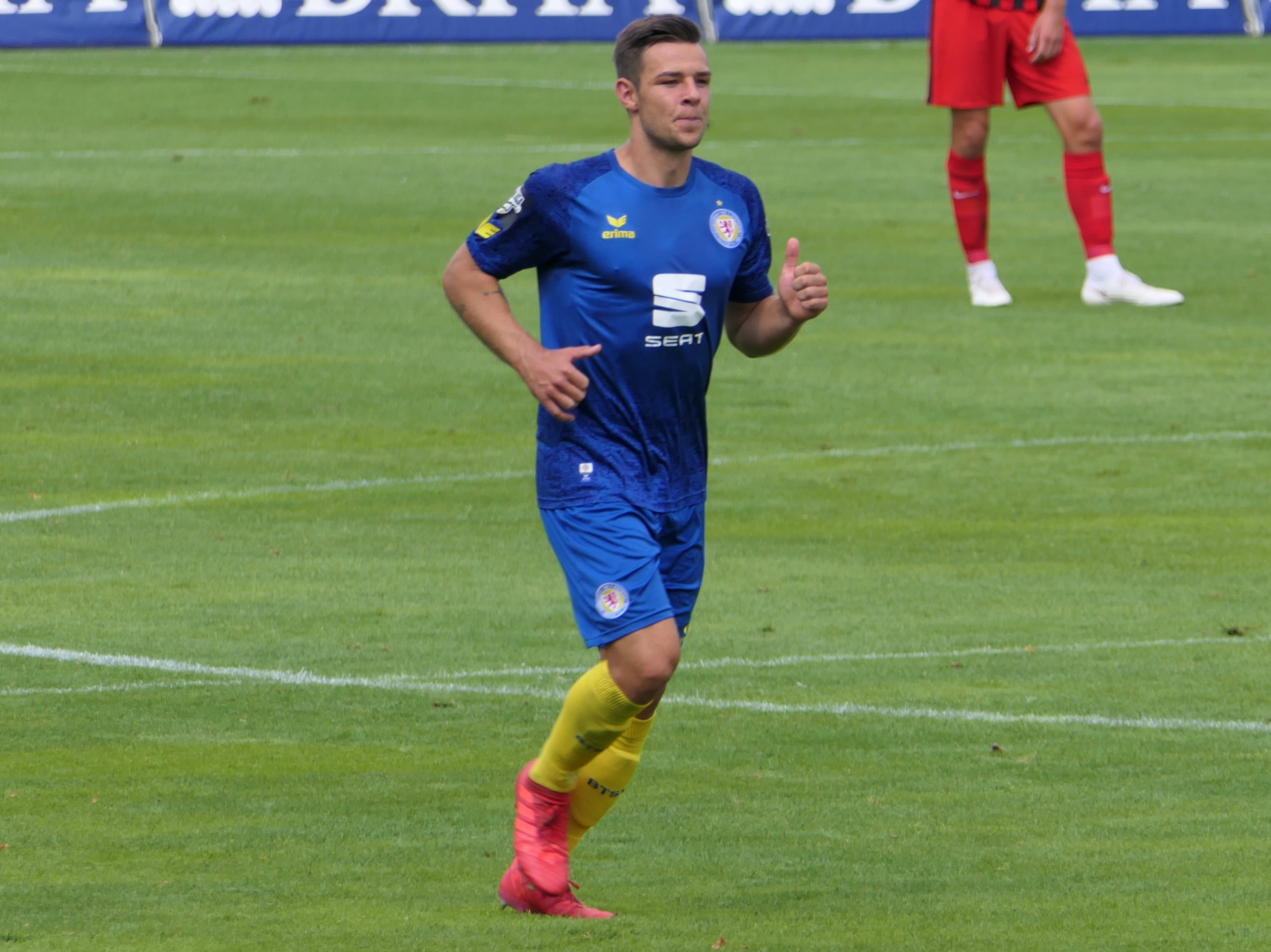 Der Fussballprofi Niko Kijewski im Trikot von Eintracht Braunschweig beim Auswärtsspiel beim SV Wehen Wiesbaden am 11.08.2018.